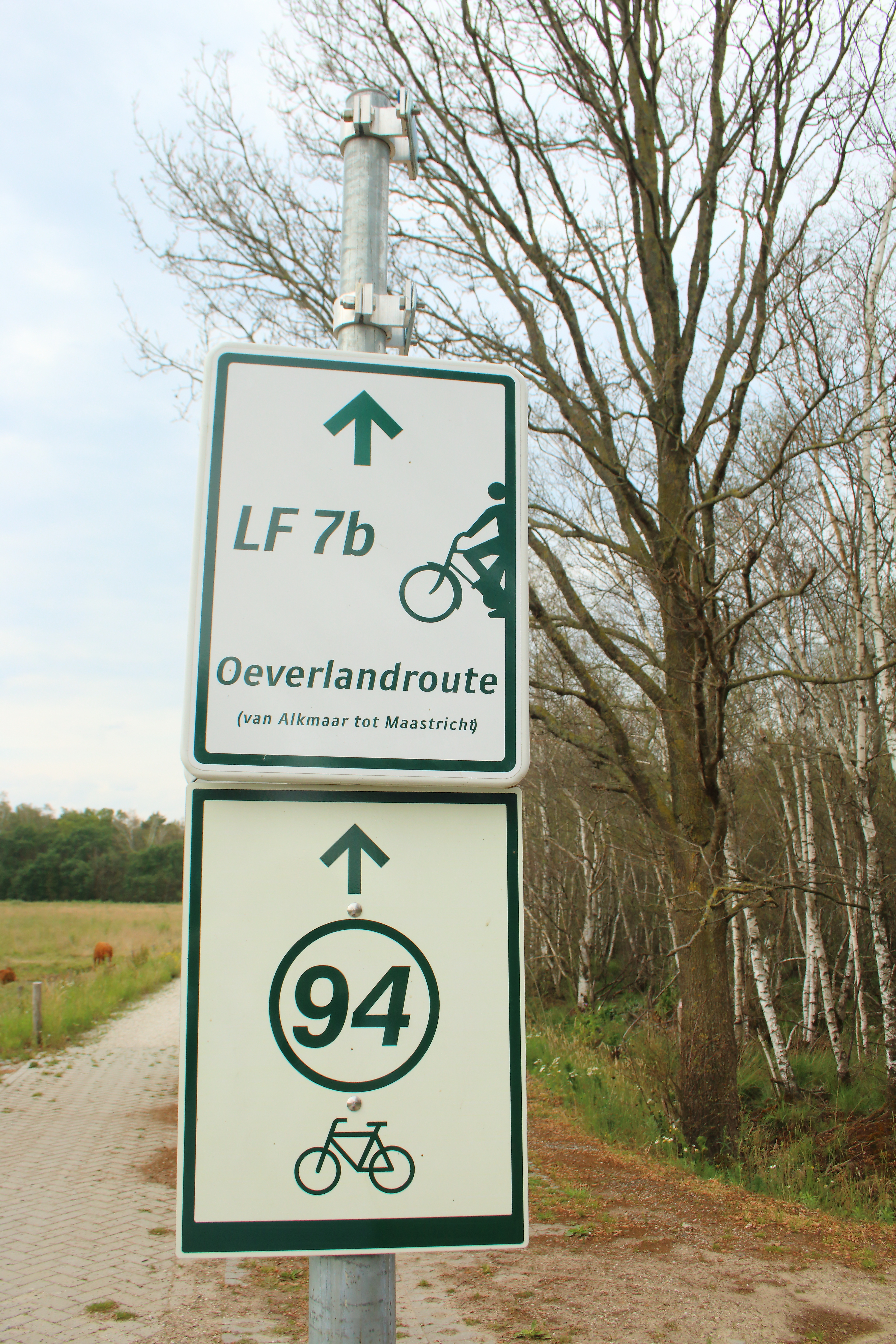 LF 7b Oeverlandroute